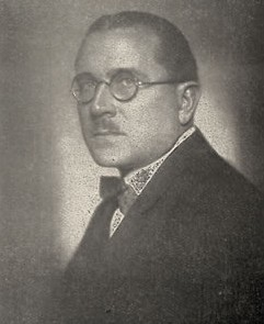 Fran Lhotka (1883 - 1962), Chorvatský hudební skladatel českého původu.